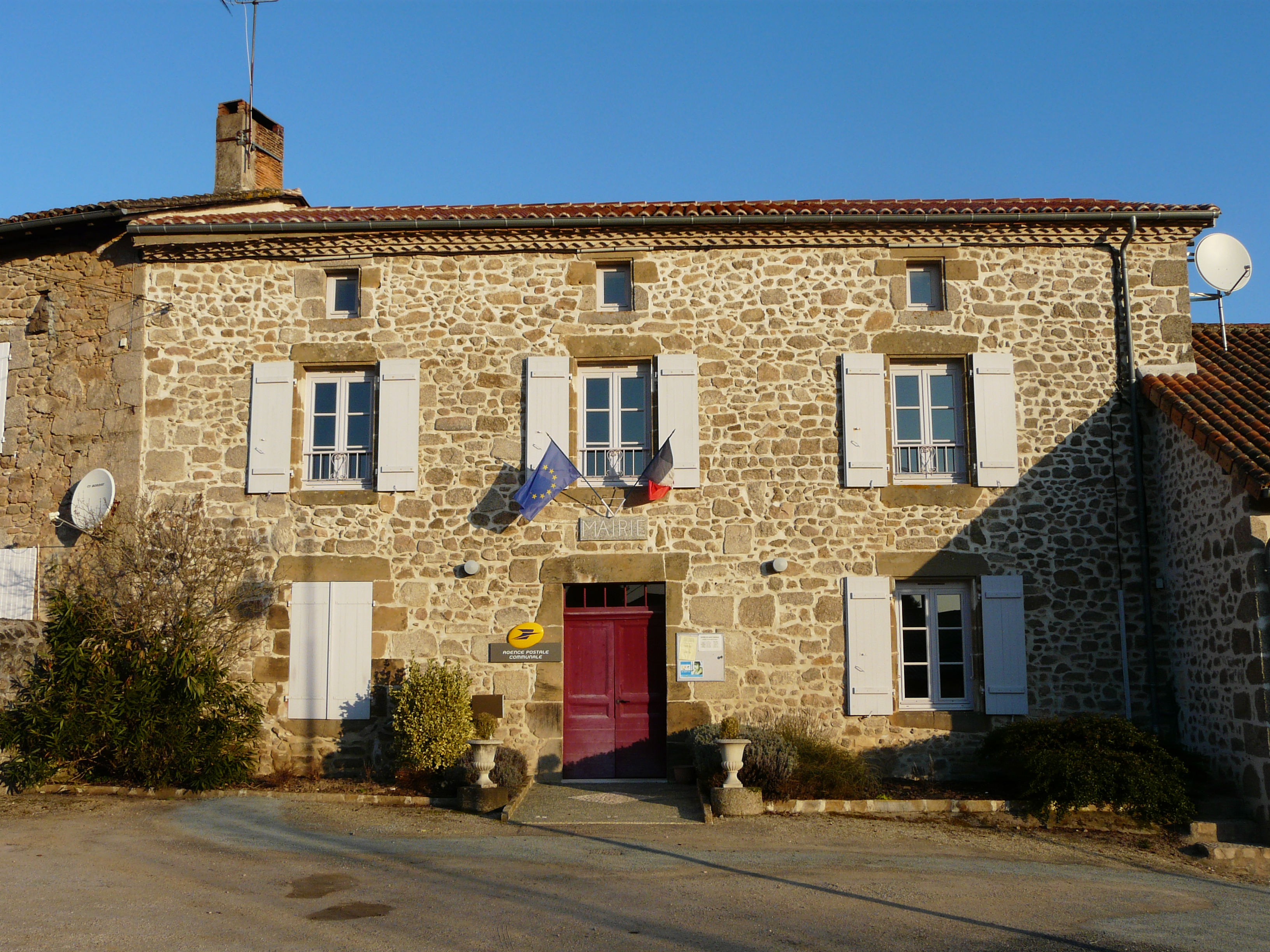 La mairie et l'agence postale de Saint-Estèphe, Dordogne, France.